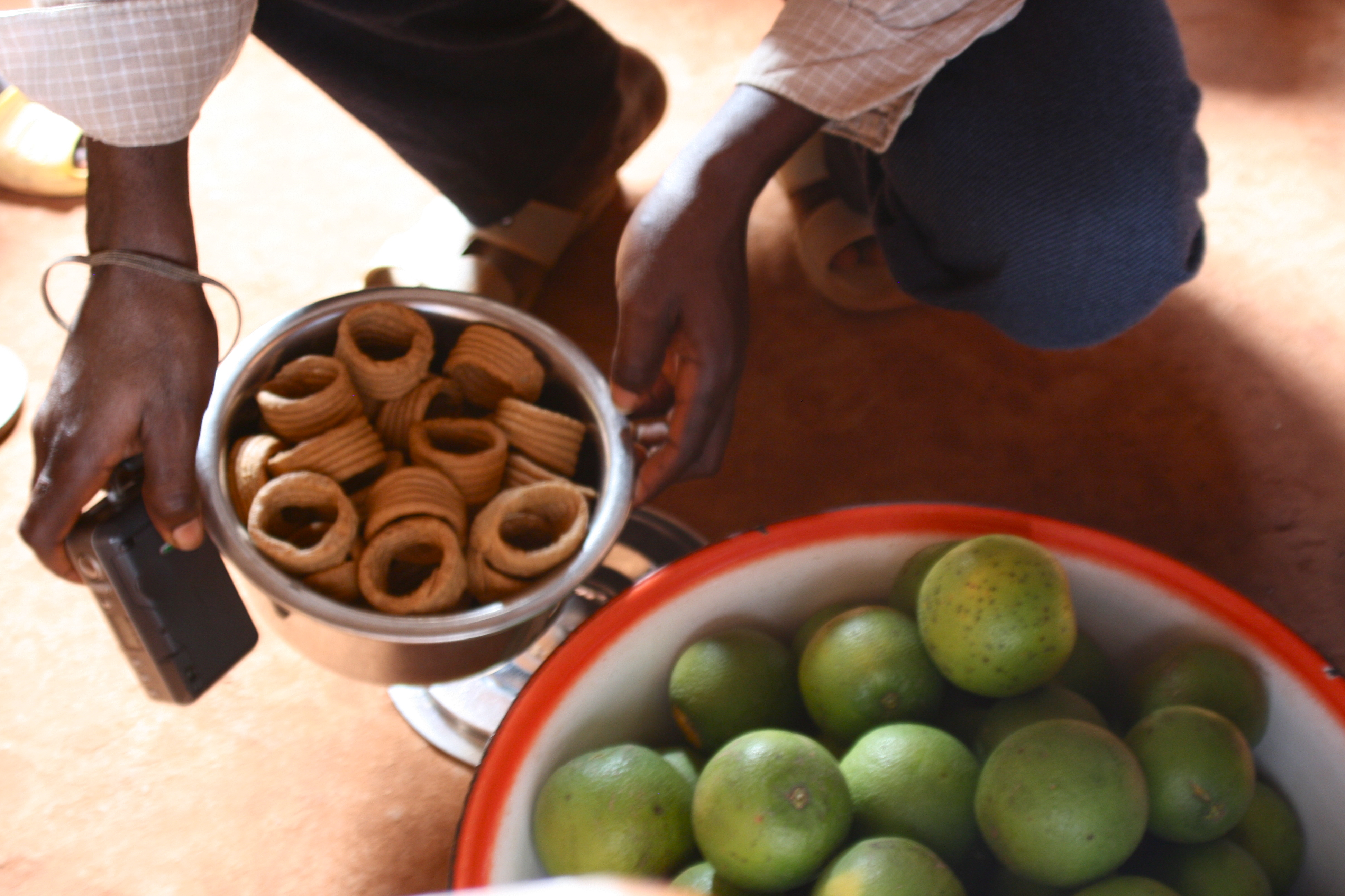 Erdnussgebäck namens Kwlikwli aus Benin.